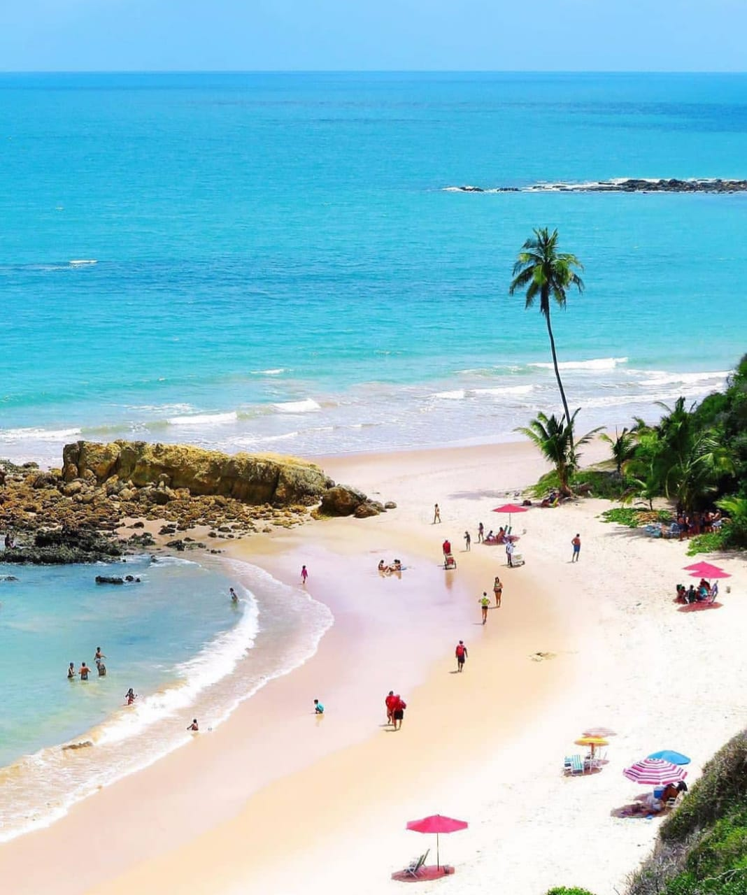 praia de Tabatinga conde paraiba brasil, nordeste paraiba